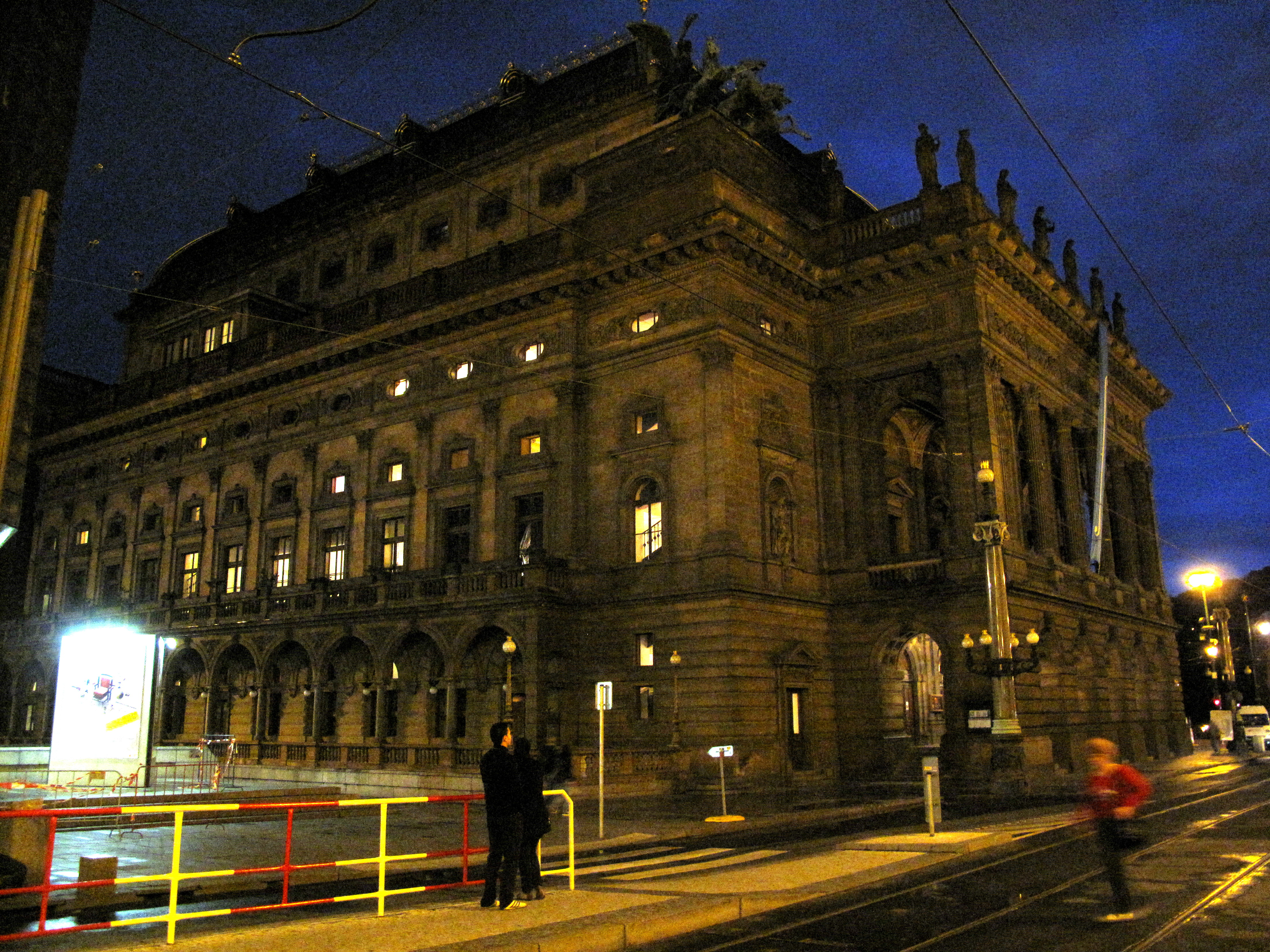 Národní divadlo v noci